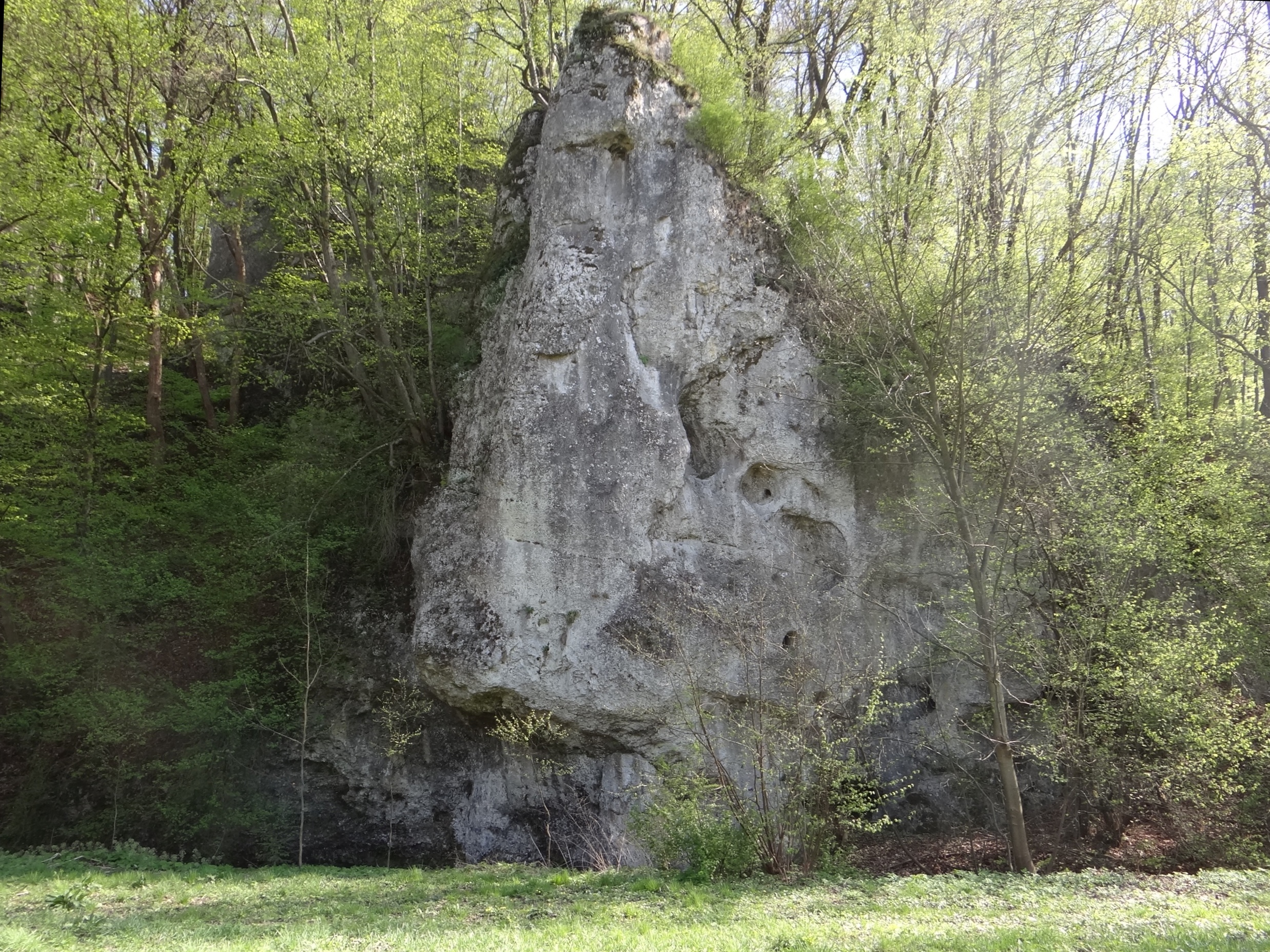 Wodna Skała w Dolinie Szklarki